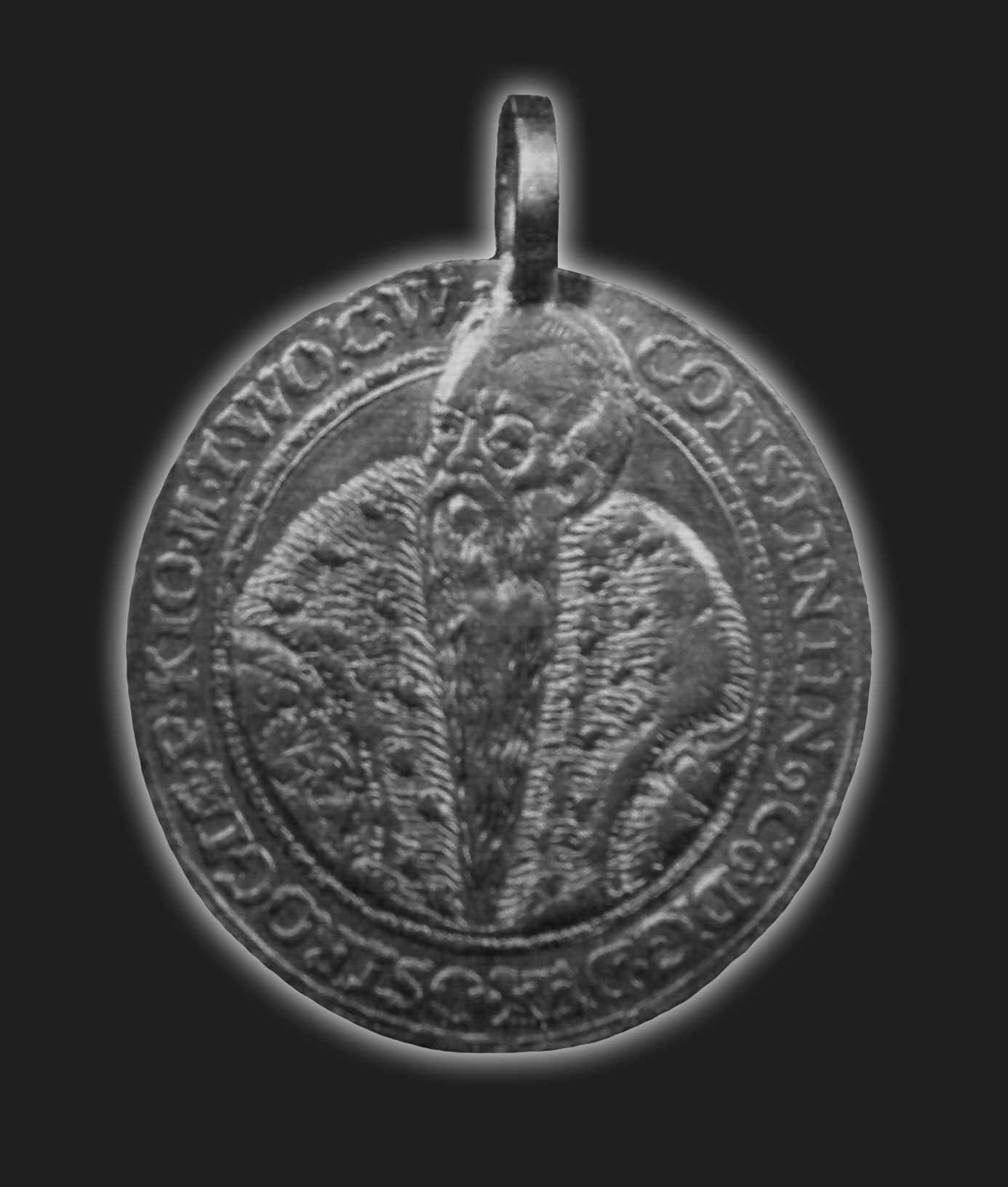 CONSTANTIN, CO.D: G. DUX. OSROGIAE. P. KIO. M. T. WO; C. W.